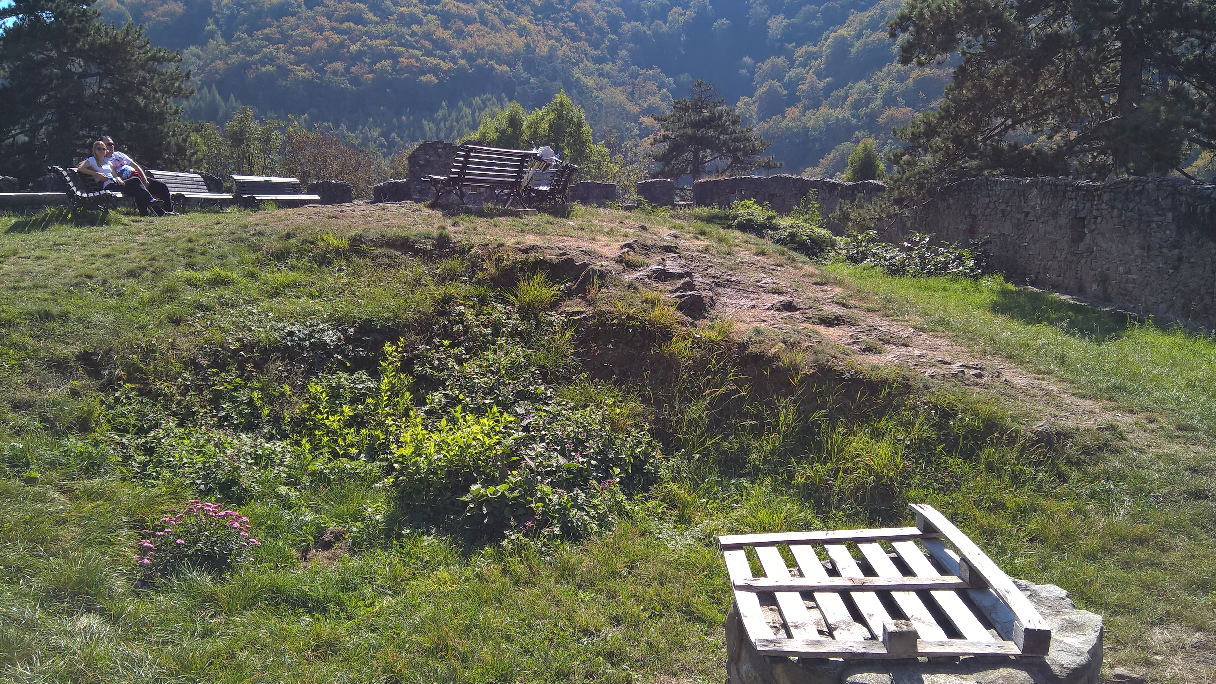 Așezare 02